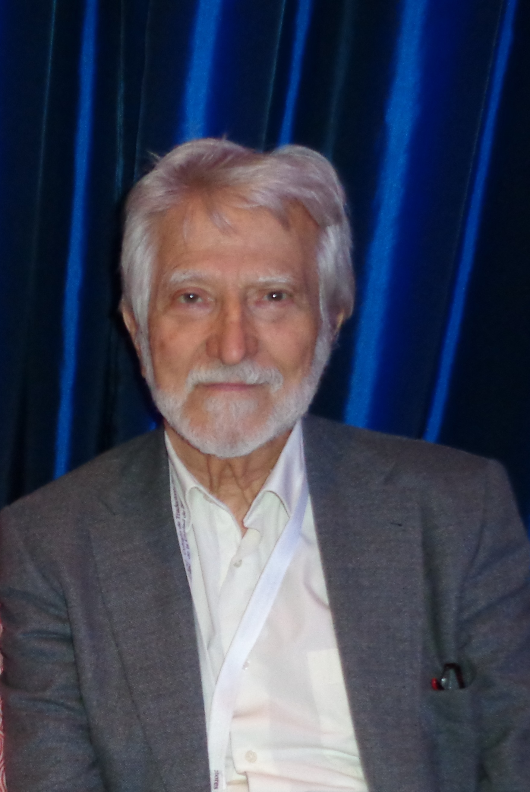 Miguel Saenz, traductor español. Sexto Congreso Latinoamericano de Traducción e Interpretación, Buenos Aires, Argentina, abril de 2016.